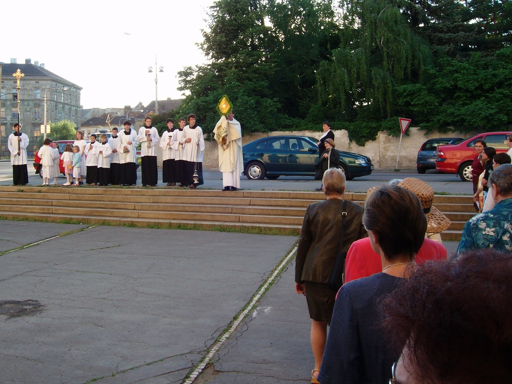 Průvod s Nejsvětější svátostí při slavnosti Těla a krve Páně (dříve tzv. Boží Tělo). Zachycuje kněze s monstrancí při žehnání městu. Snímek jsem pořídil osobně v roce 2005.